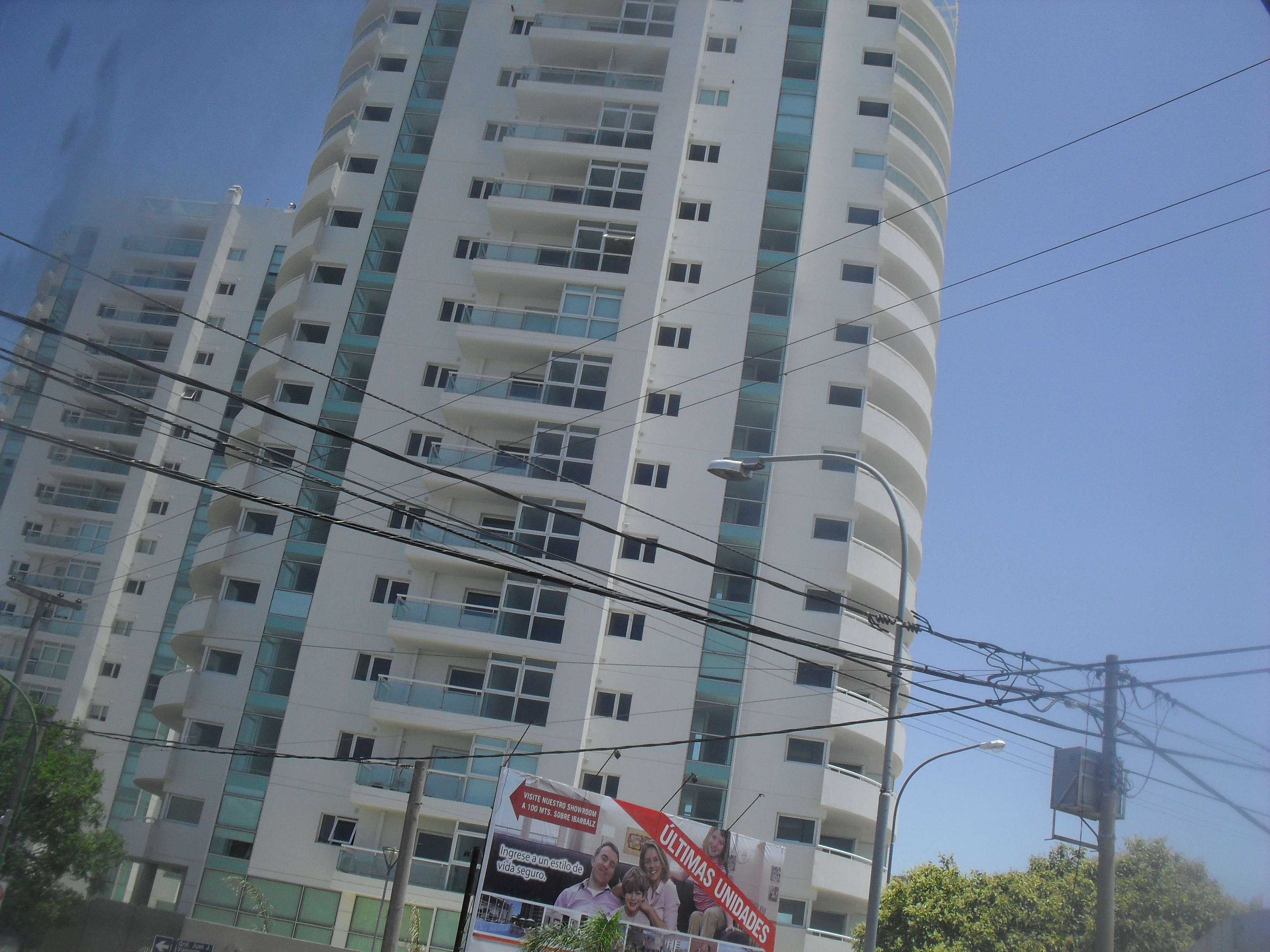 Edificios en barrio General Paz - MIRACIELOS, Residencias de Altura